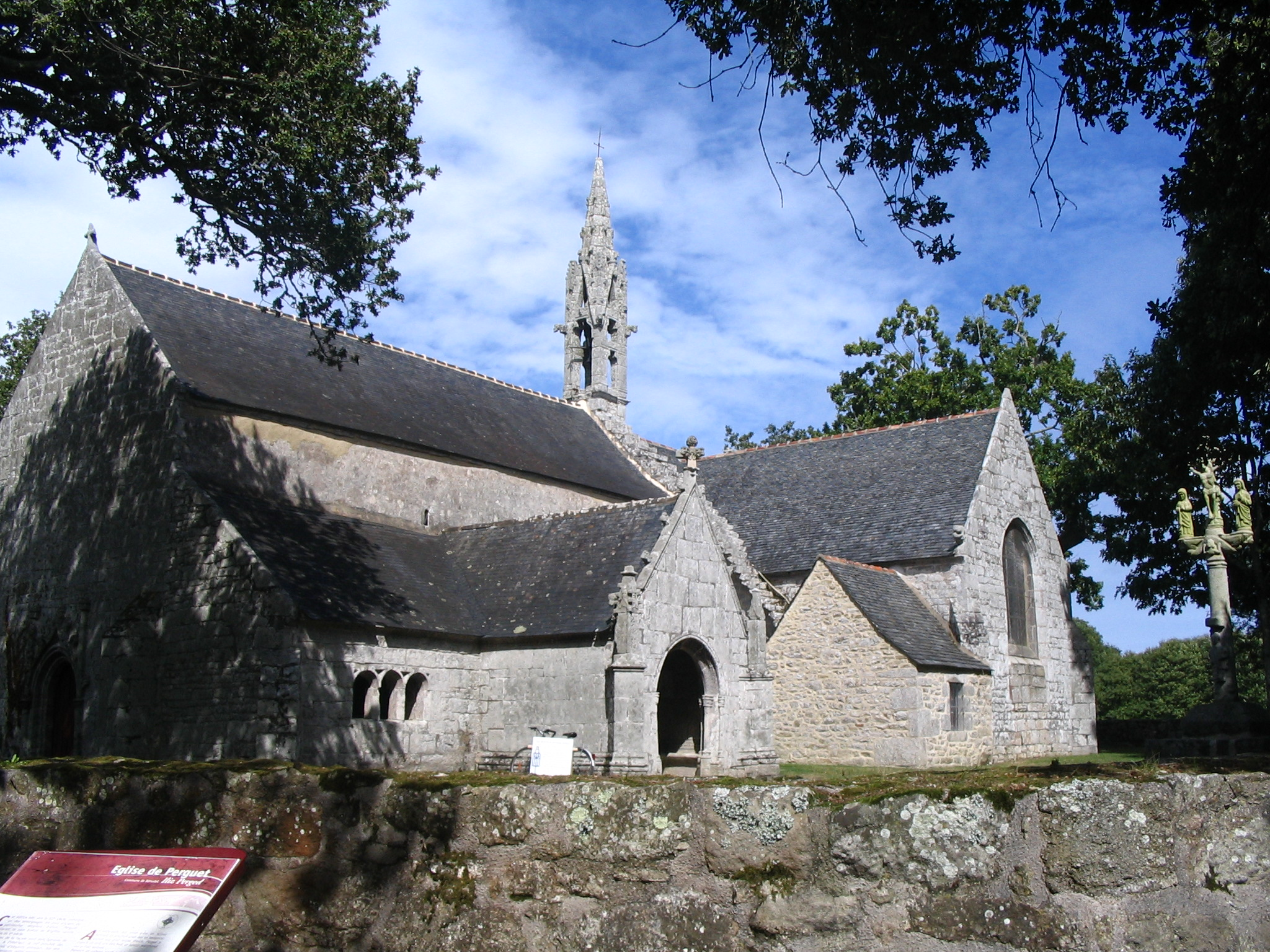 Bénodet - Chapelle de Perguet - 12 ème siècle - Finistère